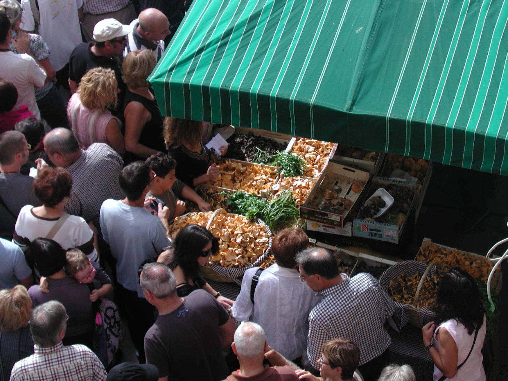 La Fira del Bolet és una fira que des del 2003 es celebra al nucli antic de Llagostera cada 12 d'octubre i recull la llarga tradició boletaire entre els massissos de les Gavarres i l'Ardenya.